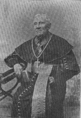 Antonín Horný (1824-1908), Český církevní hodnostář